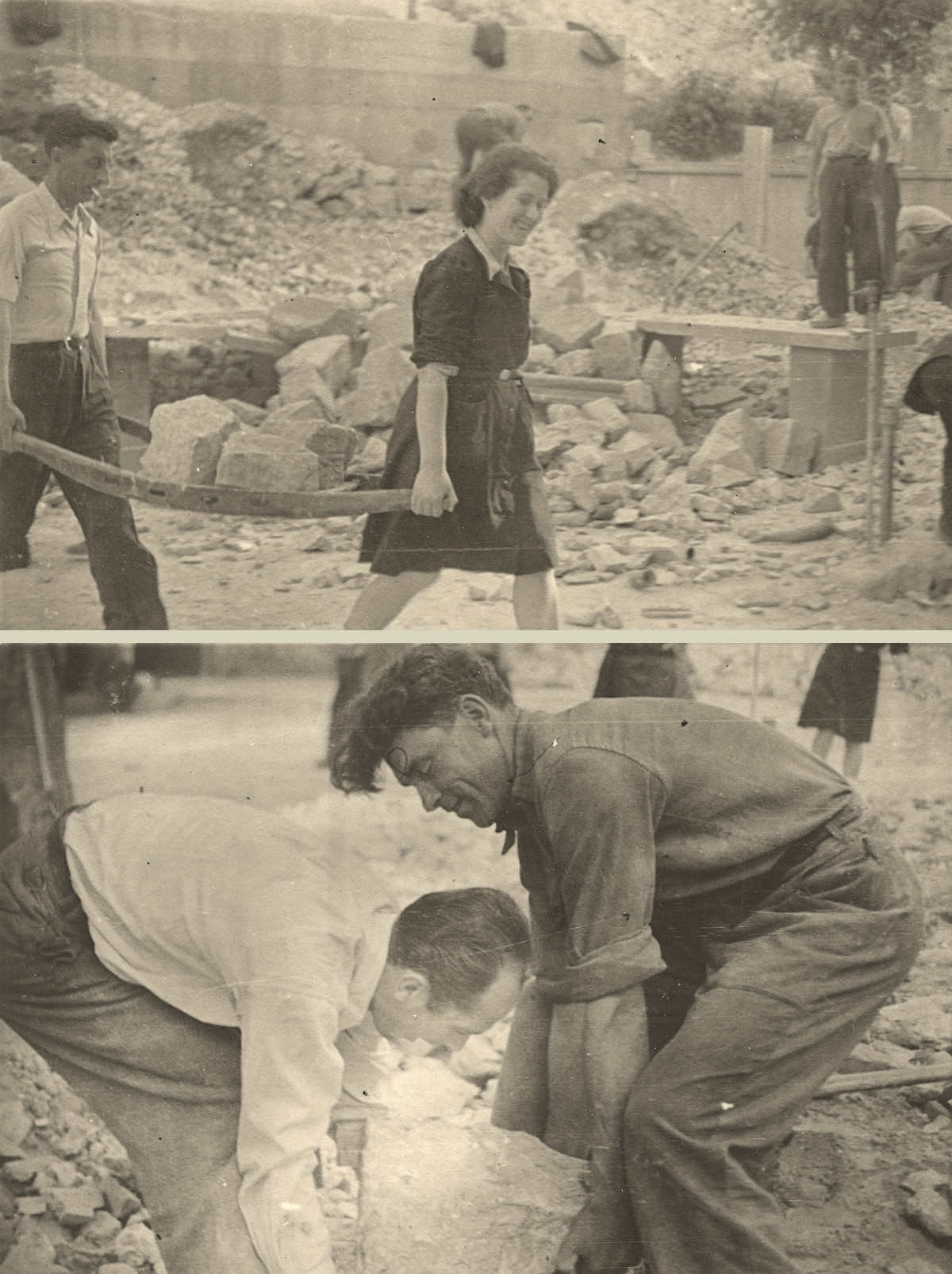 clearing rubble that remained after WWII bombing of Sinj - Ruža Breko and Ivan Pletikosić private album (1945)